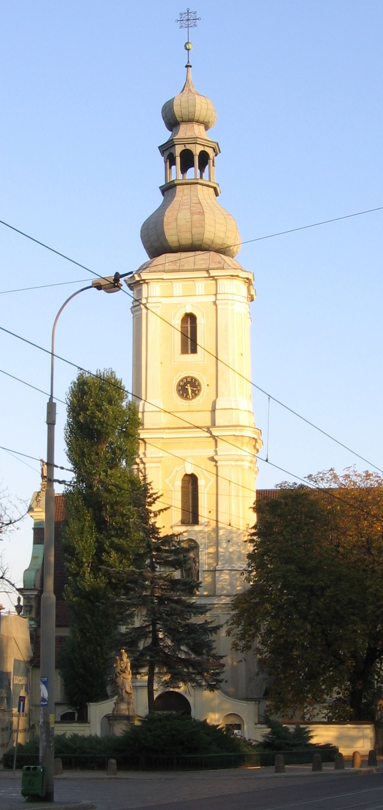 Wrocław, Poland, St. Maurice church